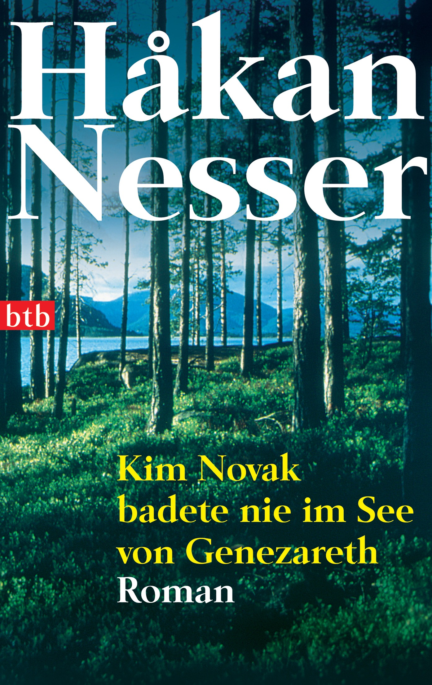 Håkan Nesser: Kim Novak badete nie im See von Genezareth. btb, München, 2012. DNB